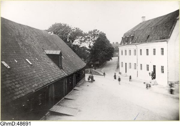 Garnisonssjukhuset vid hörnet av Kungsgatan och Lasarettsgatan i Göteborg 1889. Ljungberg, W: "Göteborgs befästningar och garnison", Bild 121. Förrådsbod under Lilla Otterhällan (till vänster) och Garnisonssjukhuset (till höger).